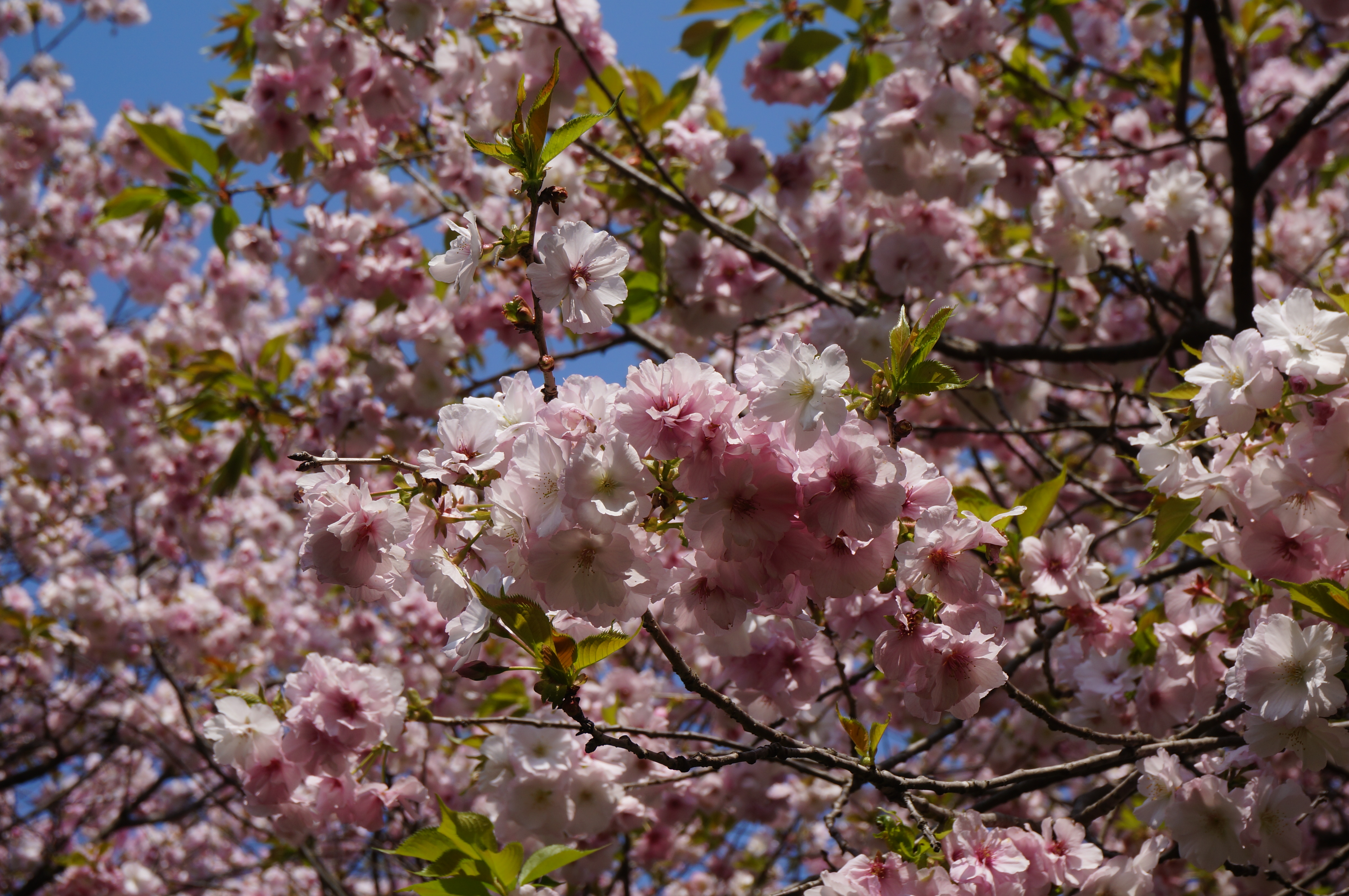 八重咲きのマツマエハヤザキ